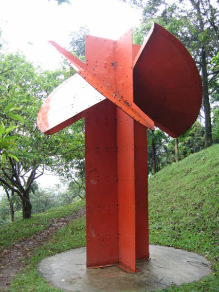 Torre by Edgar Negret (Colombia). Cerro Nutibara, MedellínSculptures Park